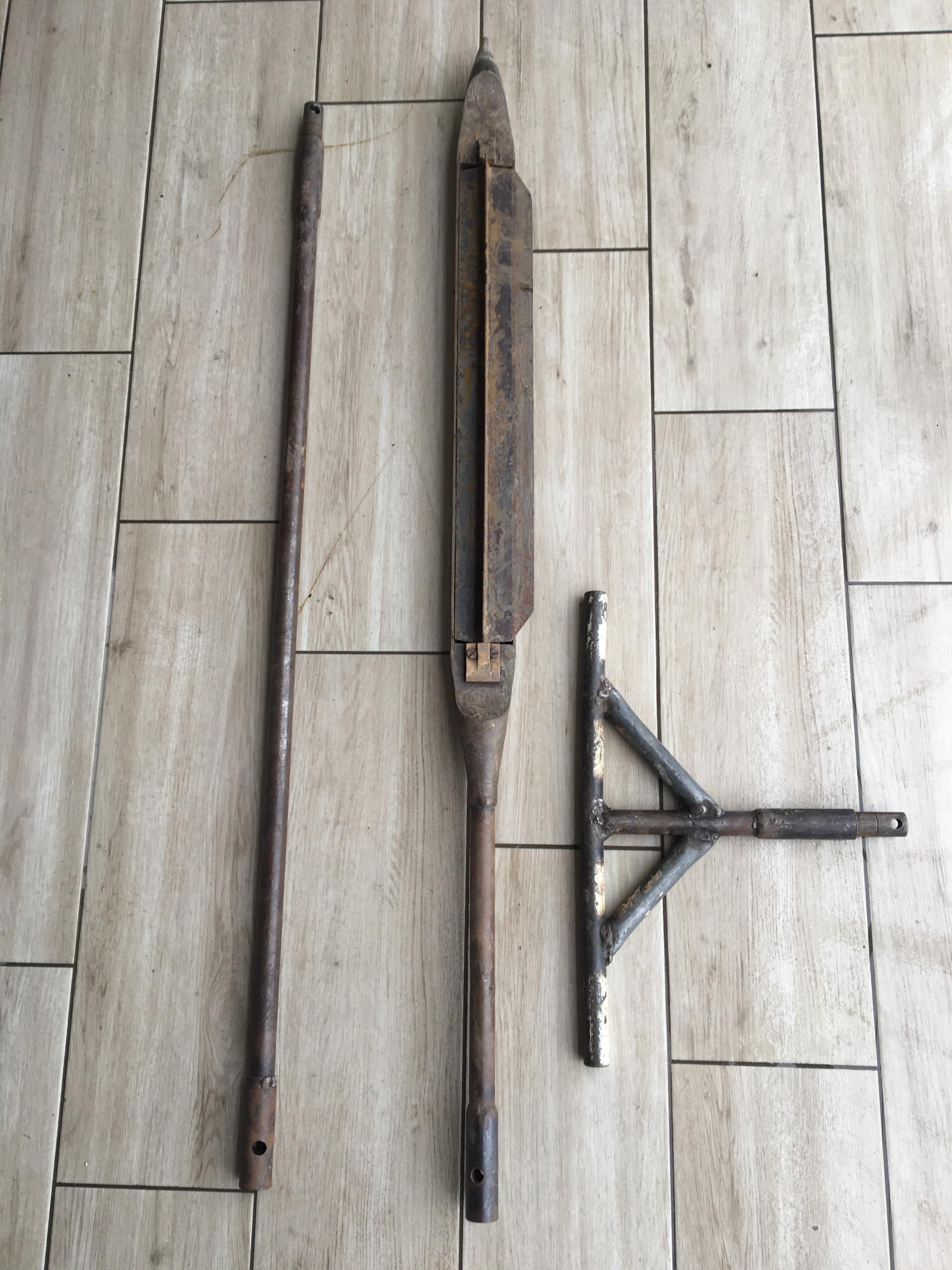 Fotografia przedstawia elementy świdra Instorf. Od lewej: trzpień, sonda z płetwą, rączka.